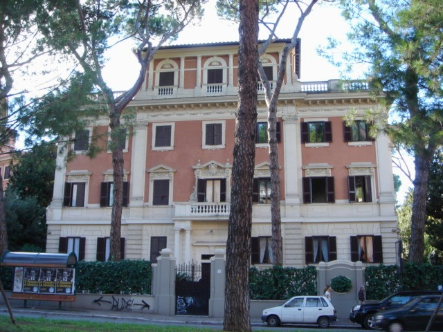 Fasaden - Collegio Svedese - Rom